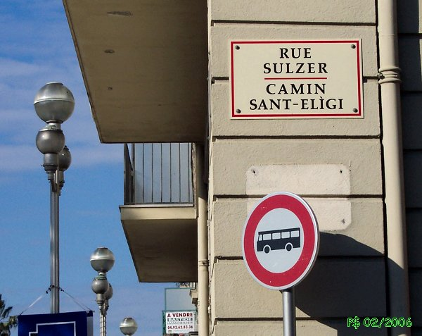 Nice - Vieille Ville Plaque d'identification de la rue prise un matin à l'angle de la promenande des Anglais.